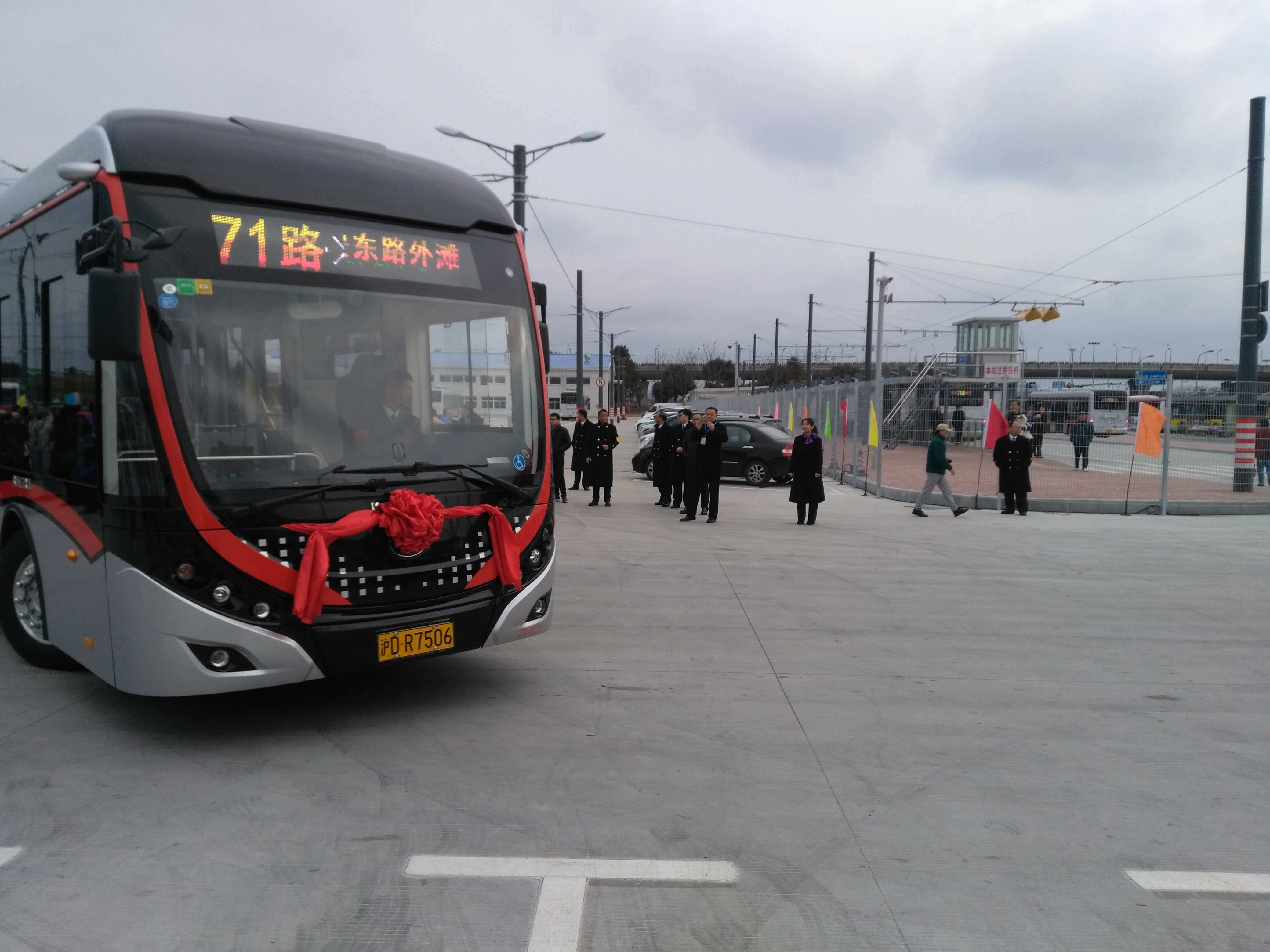 中文（中国大陆）: 图为2017年2月1日9时，自编号Z5A-0019的18米71路全程车不载客驶离申昆路枢纽站，开通仪式结束，标志着中运量正式开通运营。